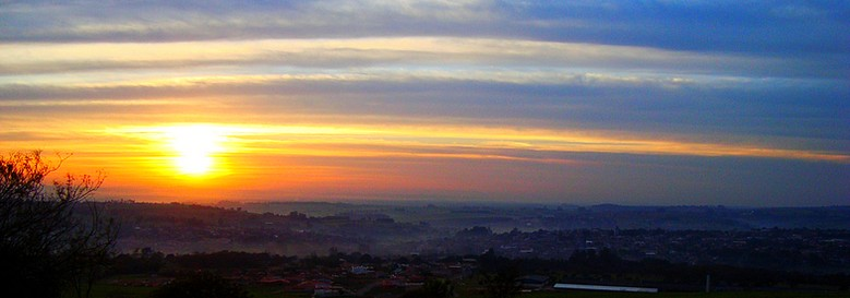 Nascer do Sol